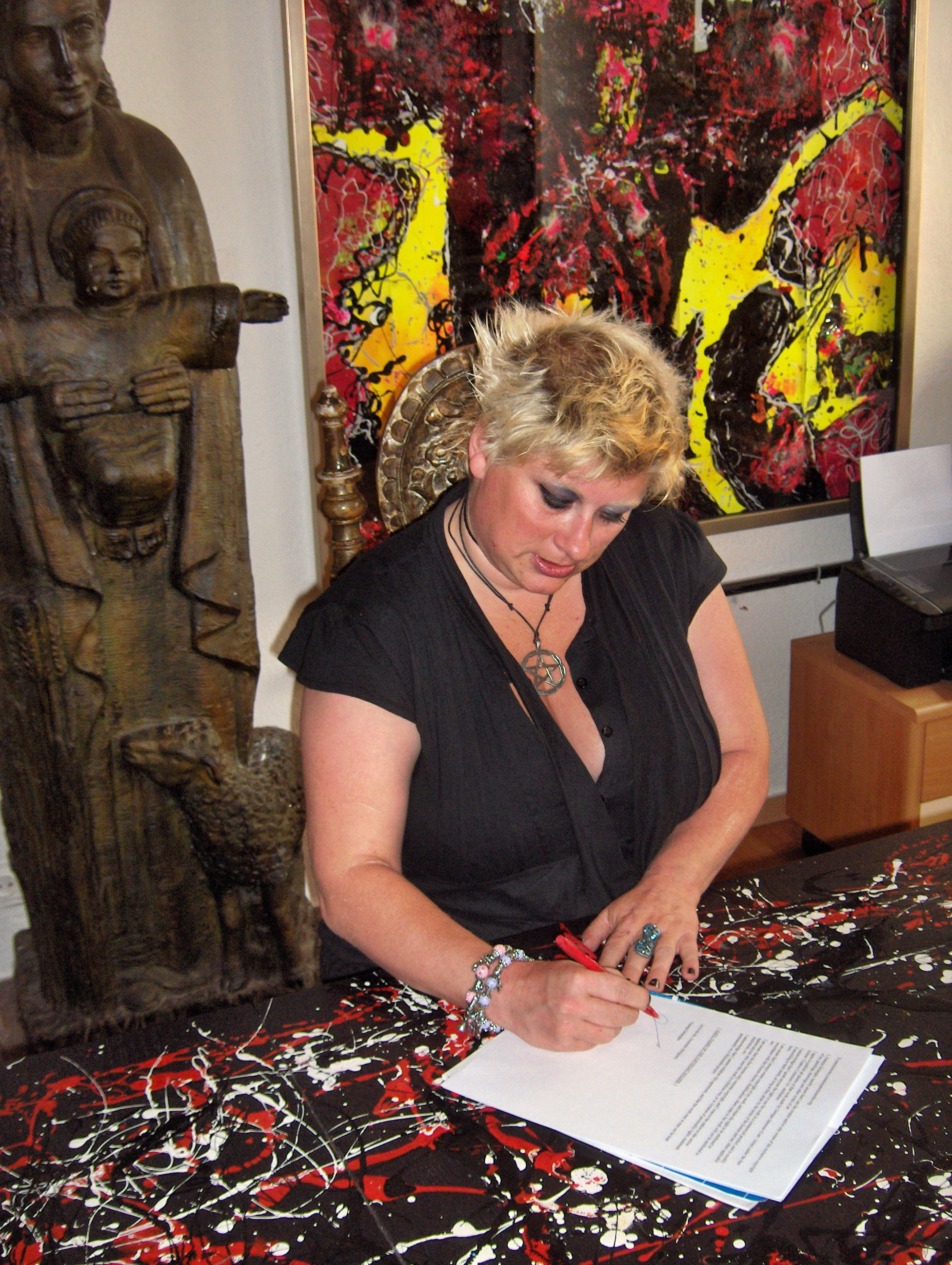 De kunstenares Natasja Delanghe in haar woning; Oostende, België